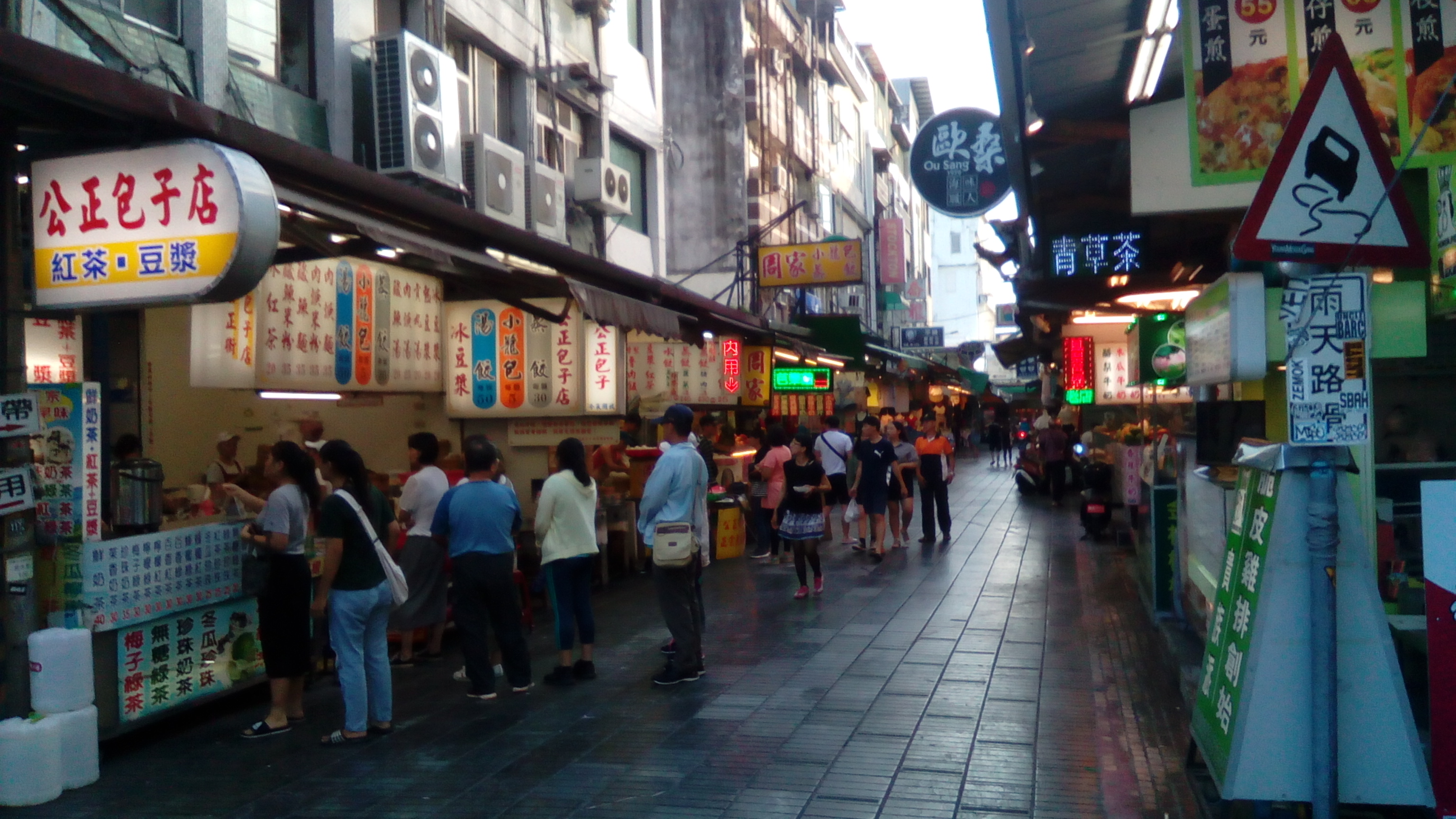 圖左為著名的公正包子店